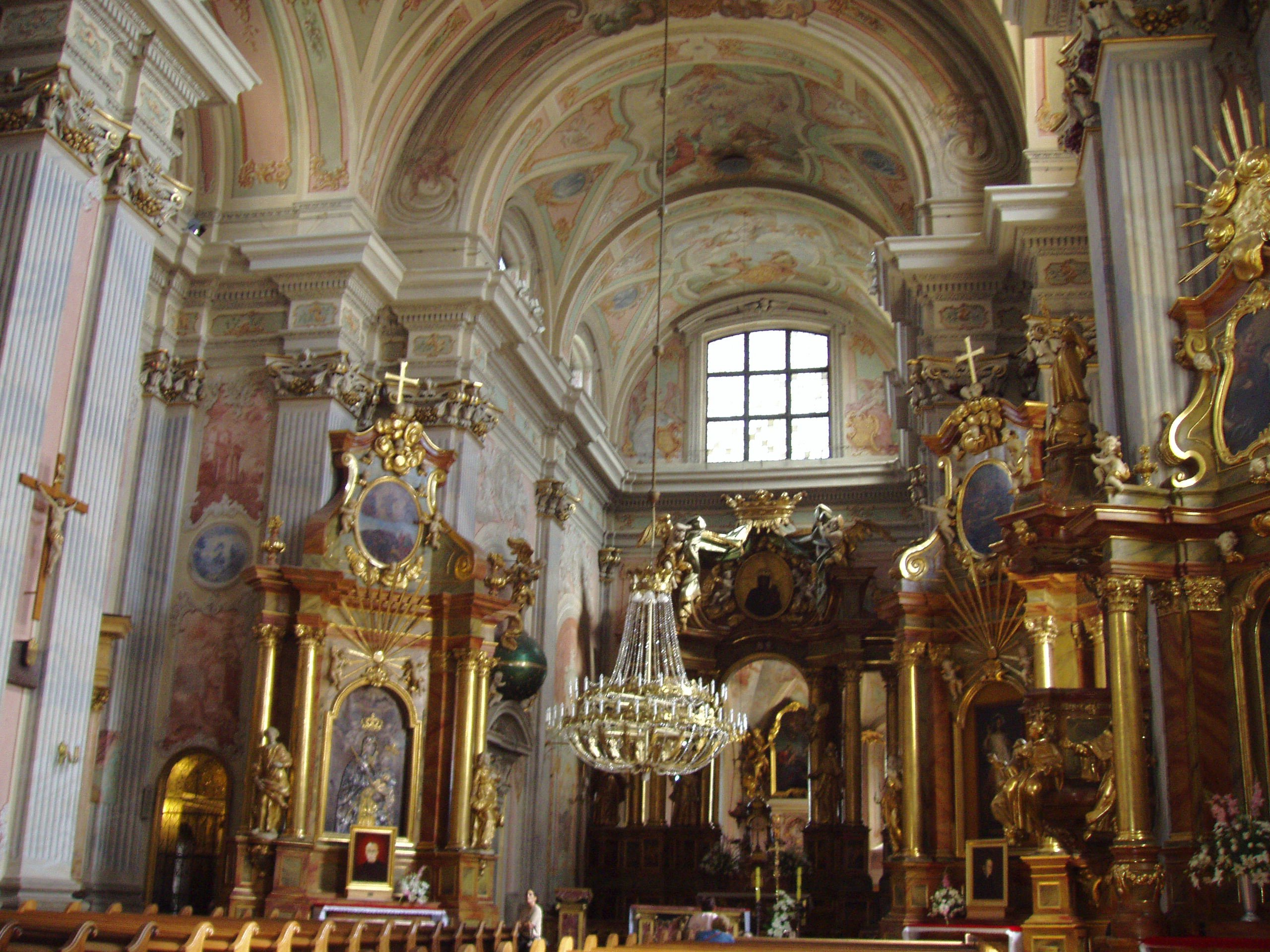 Wnętrze kościoła świętej Anny w Warszawie (fot Zu)